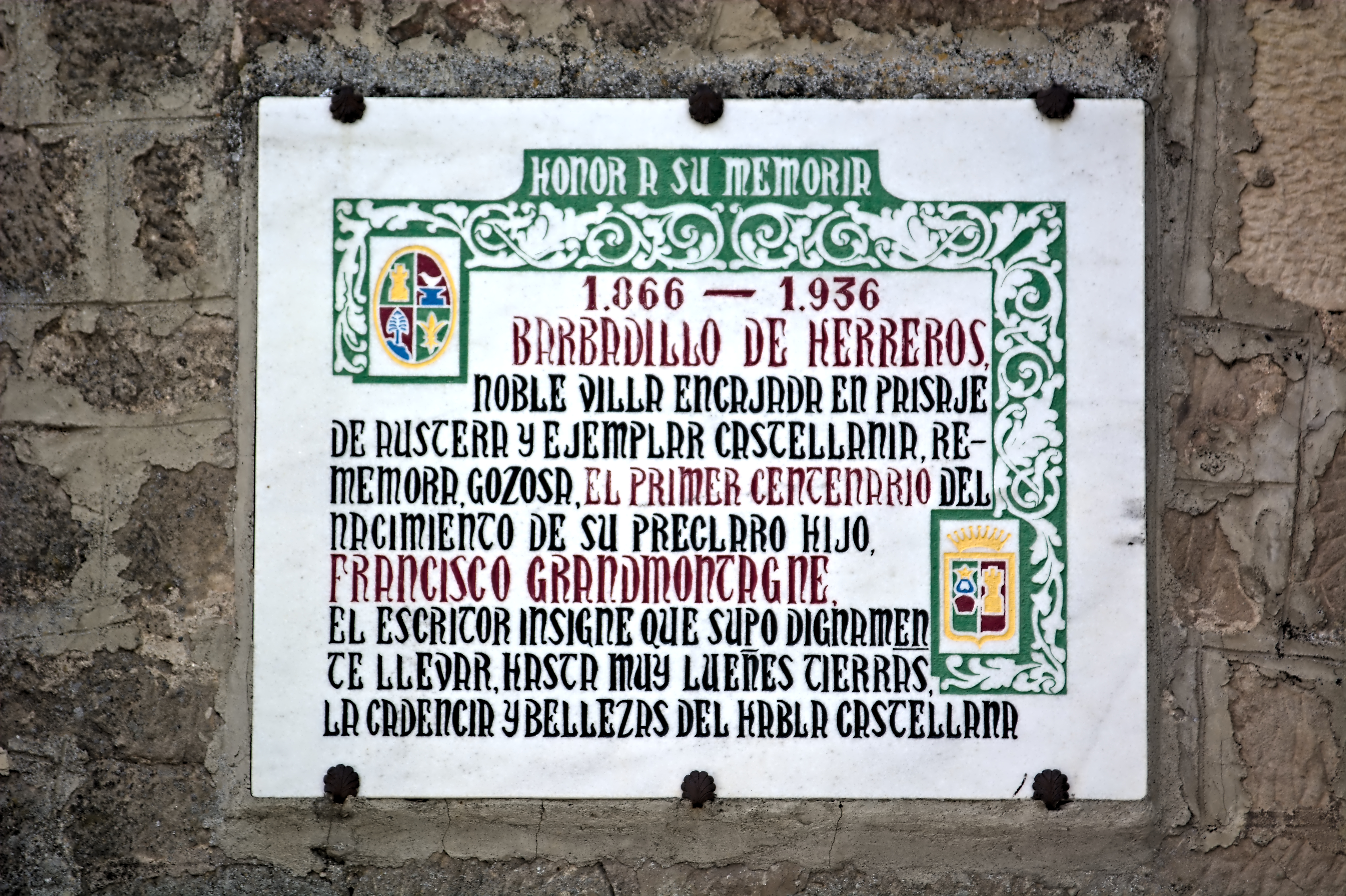 Barbadillo de Herreros